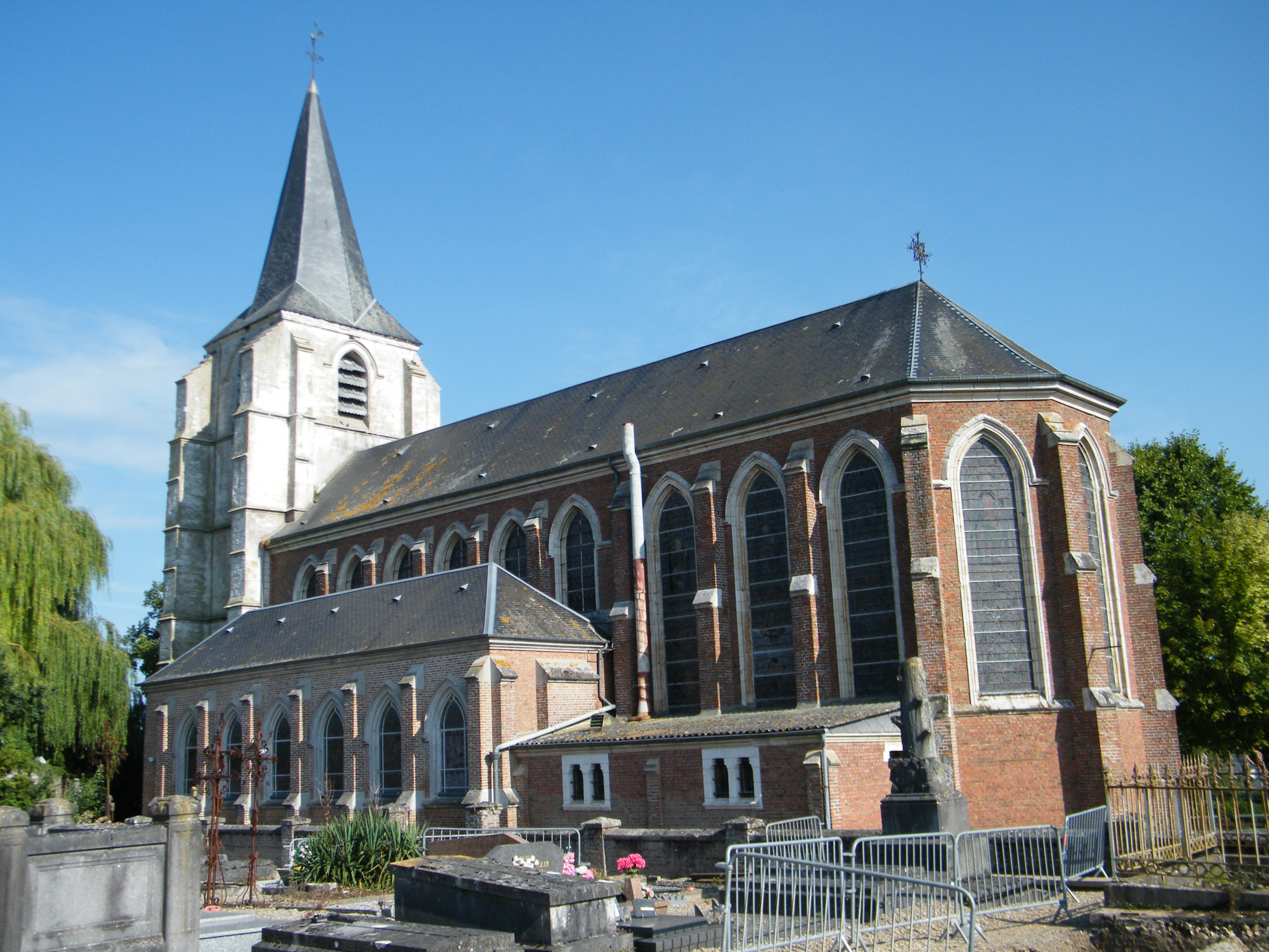 Nouvion, Somme, Fr, église (11)